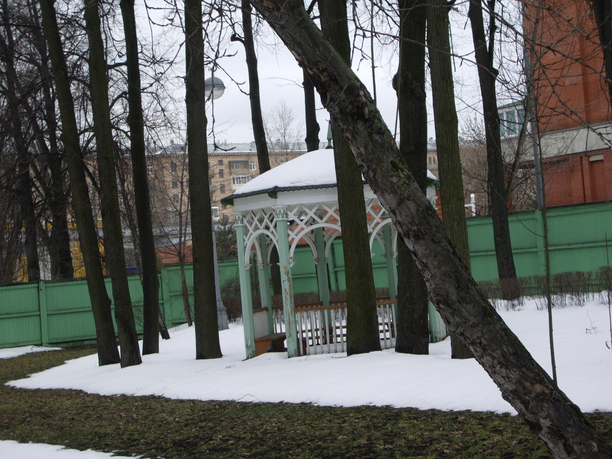 Дом, в котором в 1959-1966 гг. жил Главный конструктор космических кораблей С.П.Королев (дом-музей): Останкинская 1-я ул., дом 28, Останкинский, Северо-Восточный округ, Москва